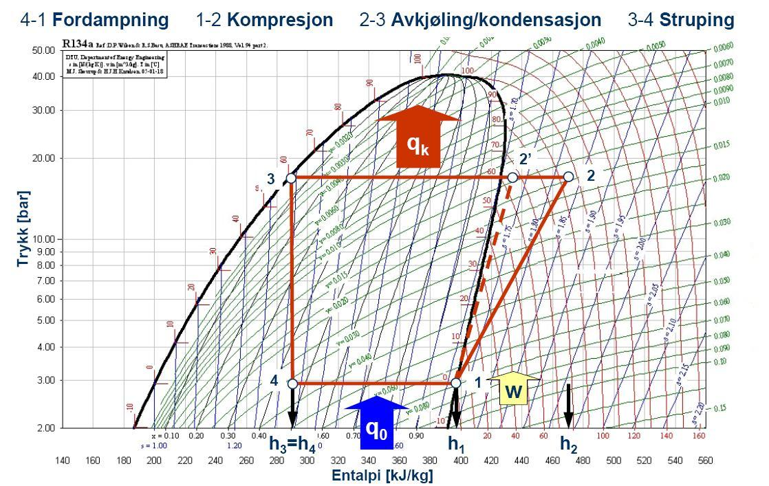 heat pump, pressure entalpy, varmepumpe, trykk entalpi